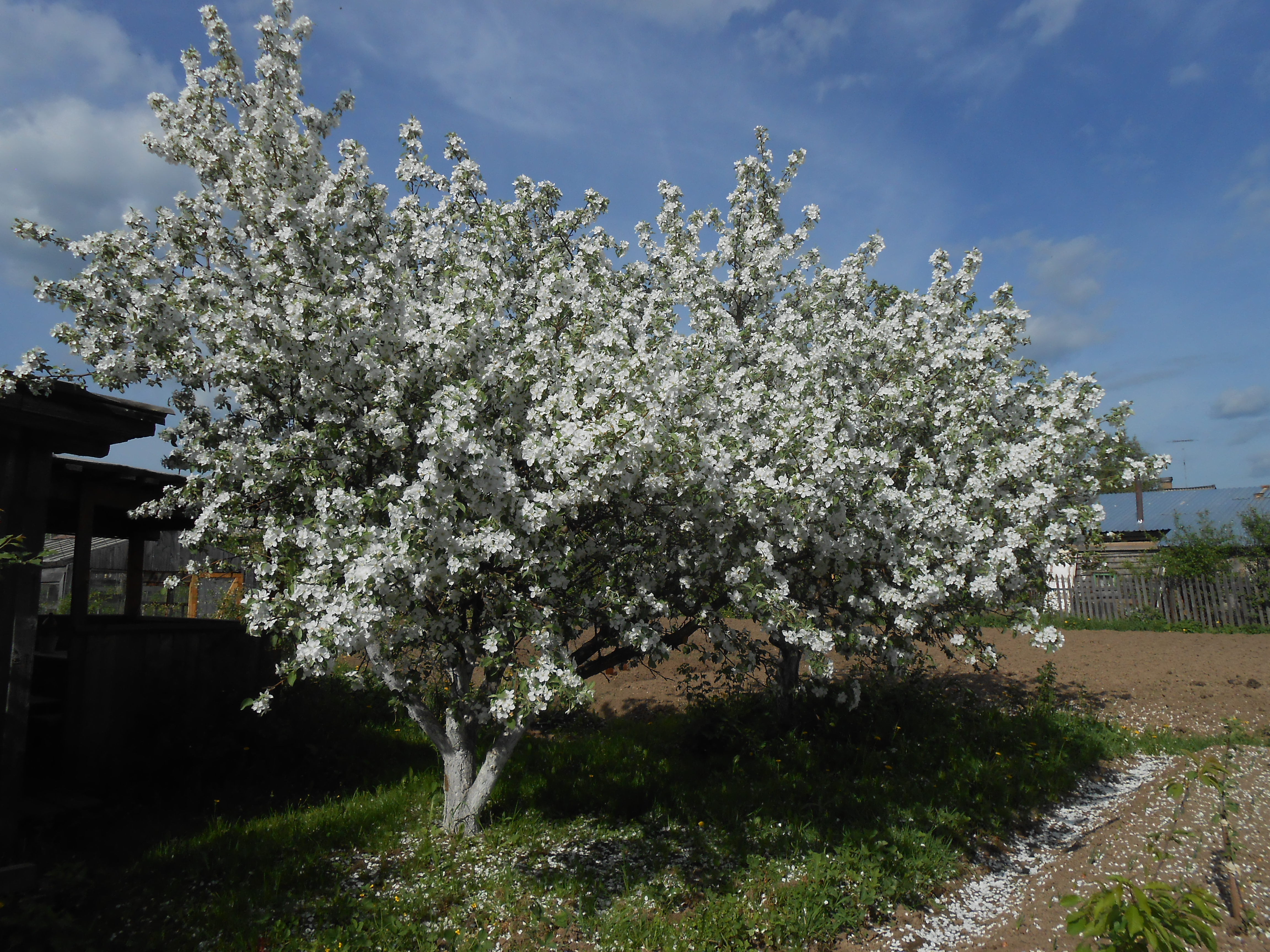 Яблони в период цветения.